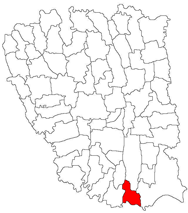 Categorie:Hărţi ale judeţului Galaţi